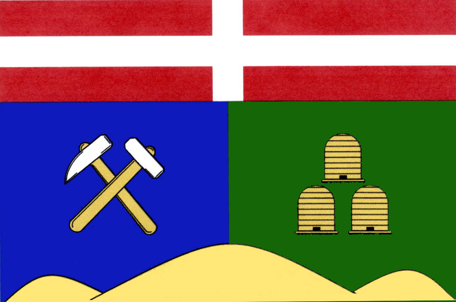 Vlajka obce Včelákov